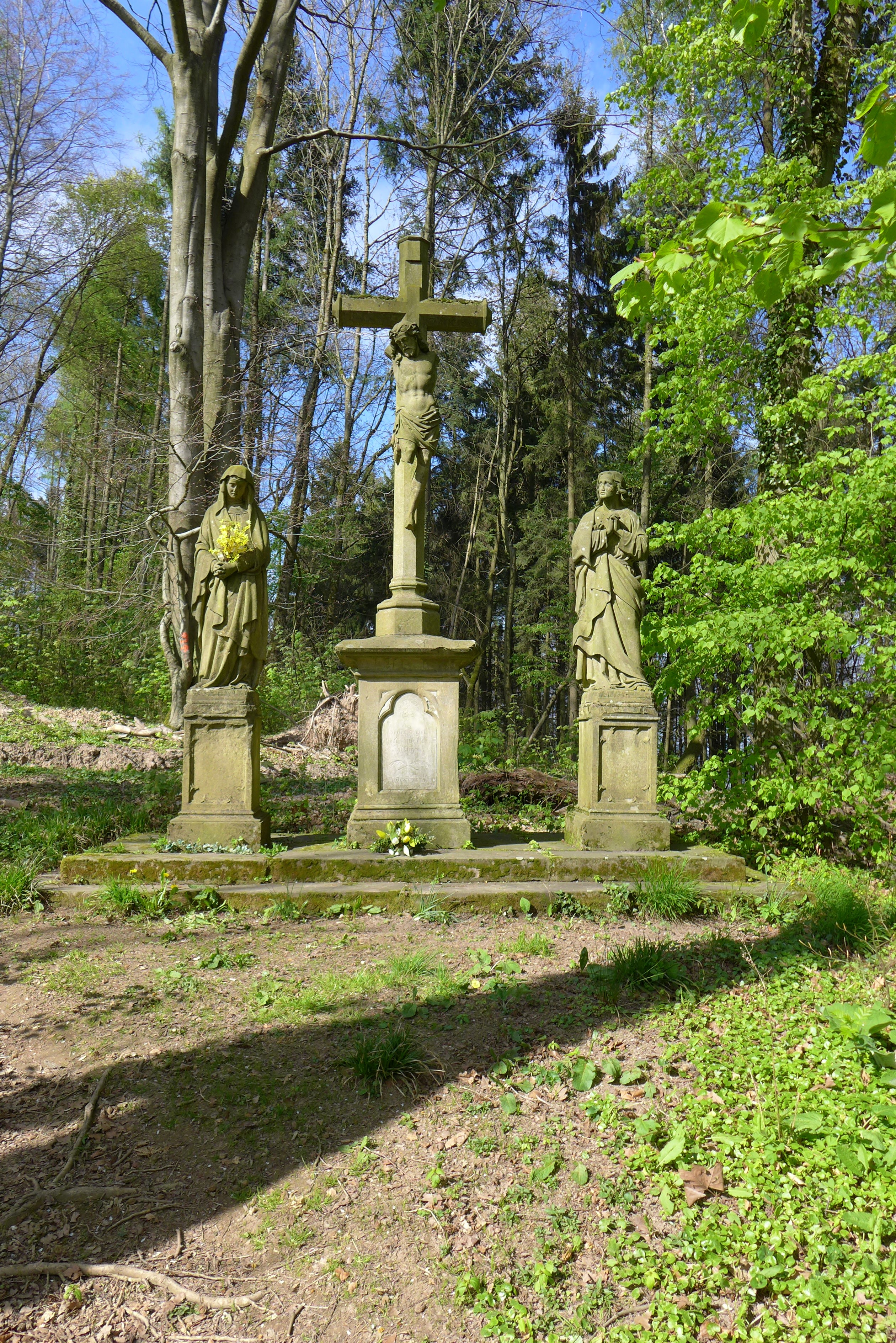 Wallerfangen, Limberg, Kreuzweg mit Kreuzigungsgruppe